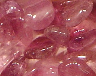 améthyste polie, d'origine brésilienne.